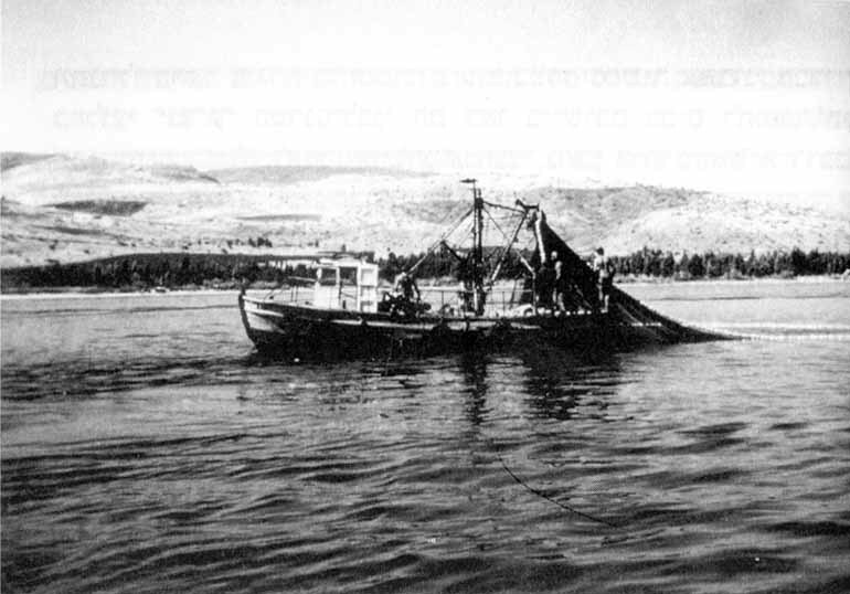 דיג בכנרת